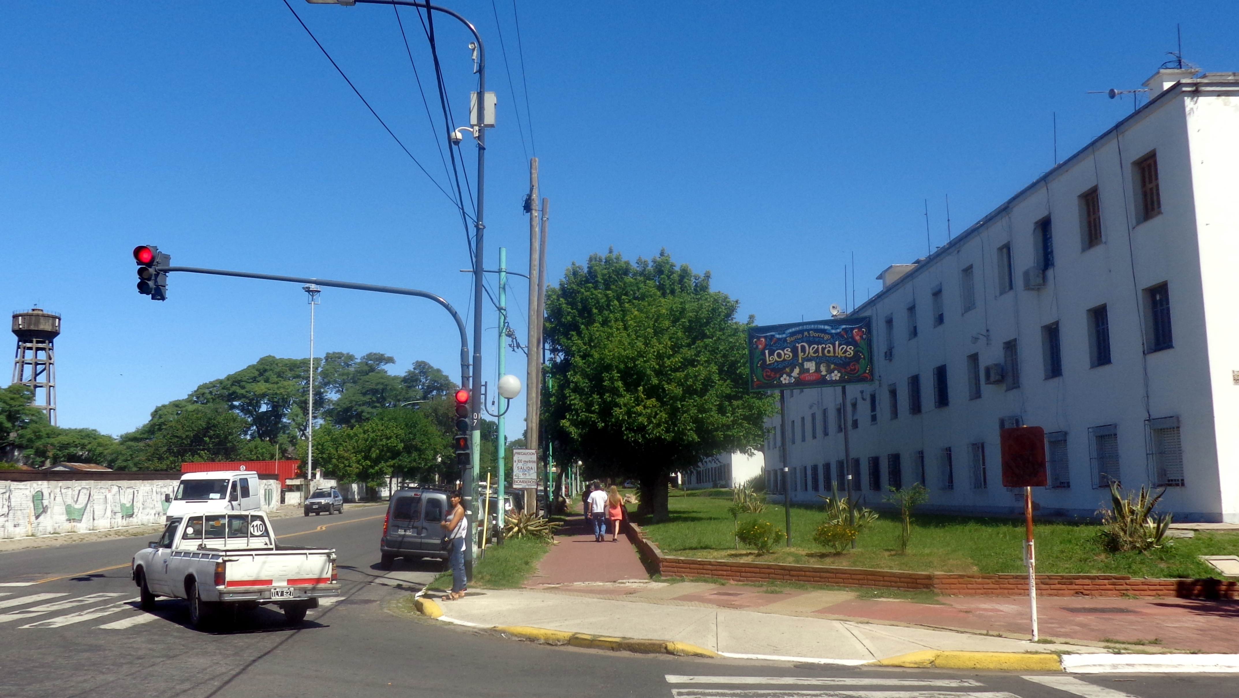 Esquina de Avenida Lisandro De La Torre y calle Justo Antonio Suárez, Barrio Los Perales (oficialmente: "Manuel Dorrego"), en Mataderos, Ciudad de Buenos Aires, Argentina.